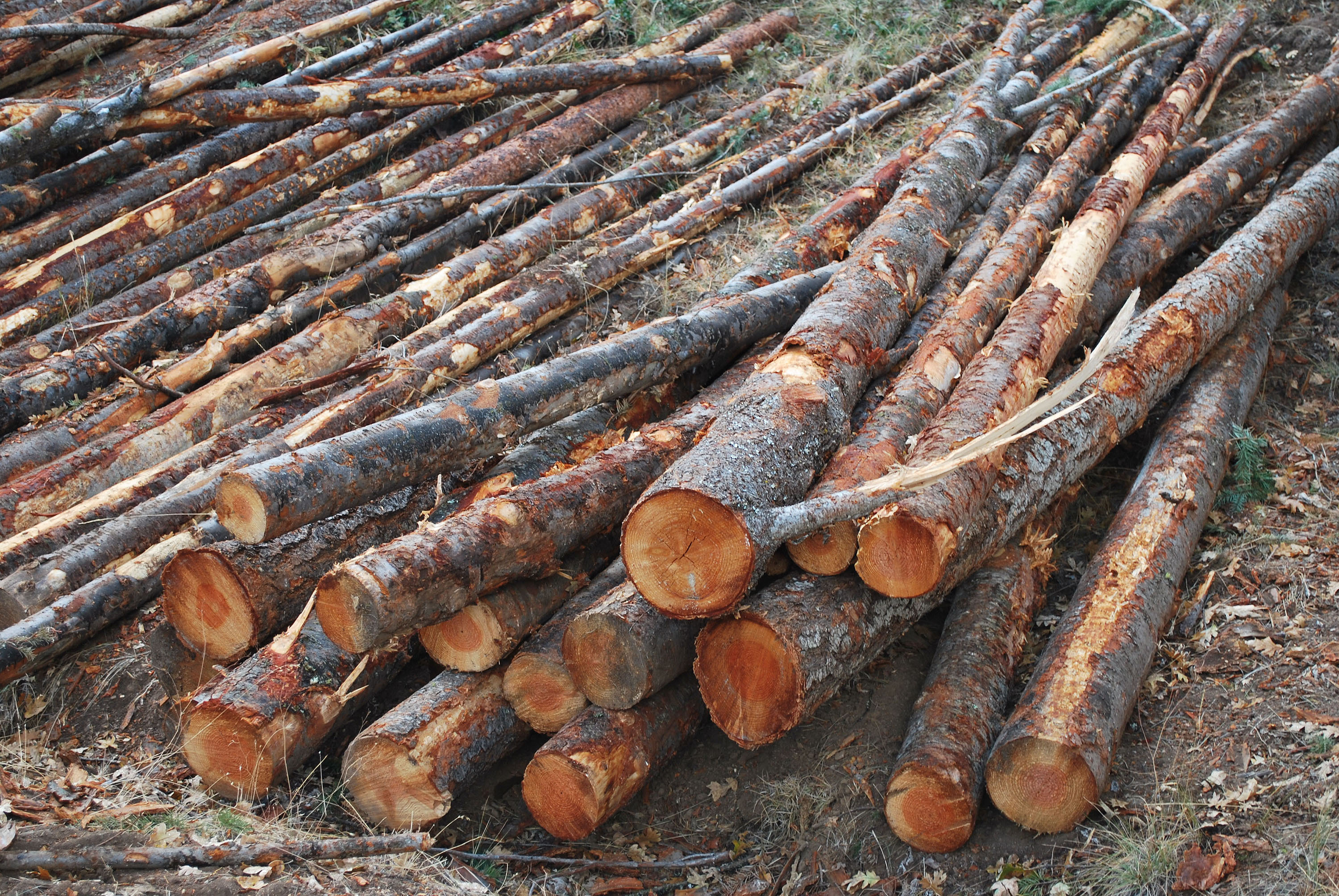 (Matt Baun/USFWS)